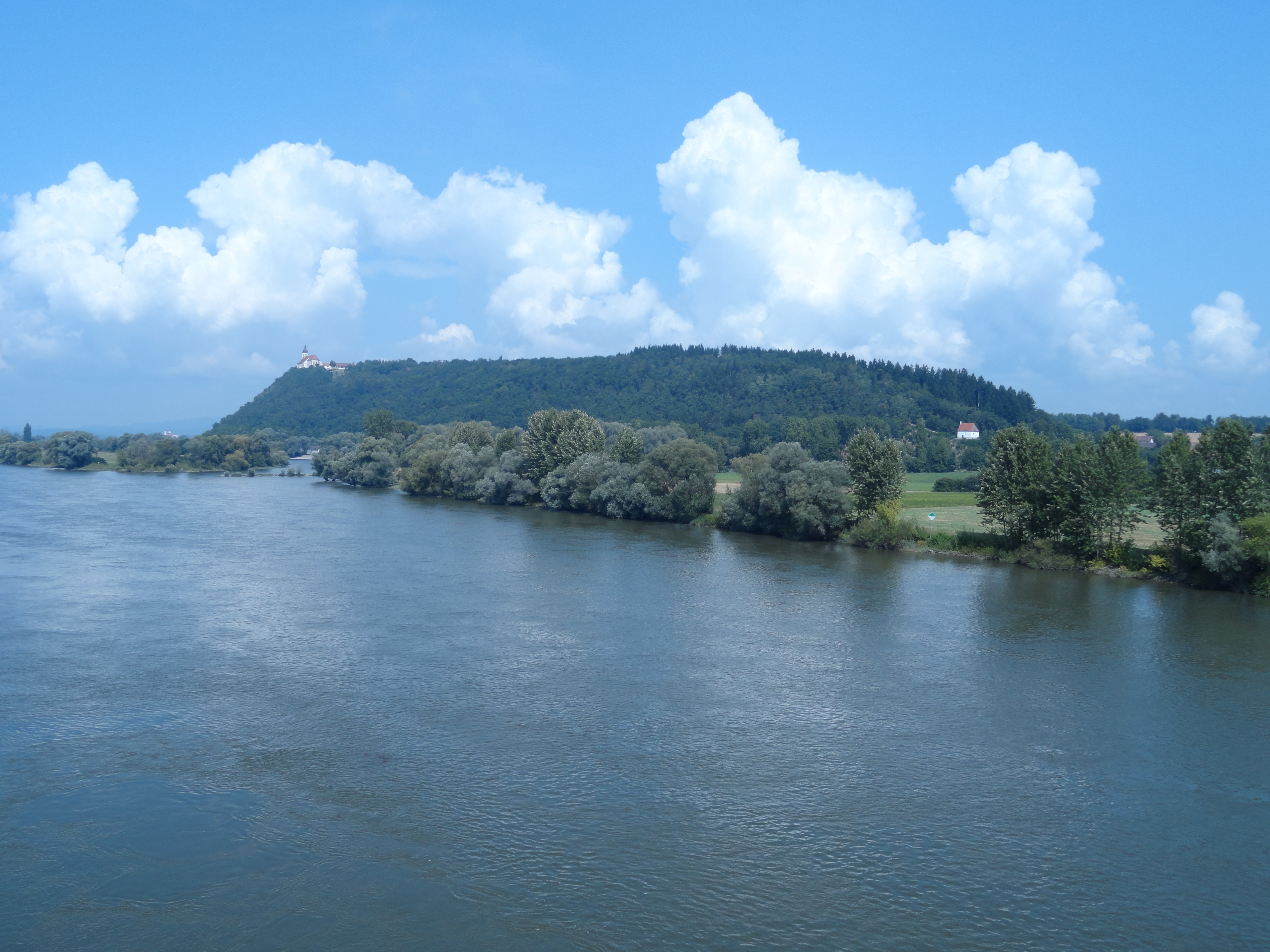 Bogenberg von Xaver-Hafner-Brücke gesehen; mit Wallfahrtskirche Mariä Himmelfahrt und Kapelle St. Ulrich in Hofweinzier; Kloster Oberalteich im Hintergrund; Donau oberhalb der Xaver-Hafner-Brücke; Bogener Altwasser